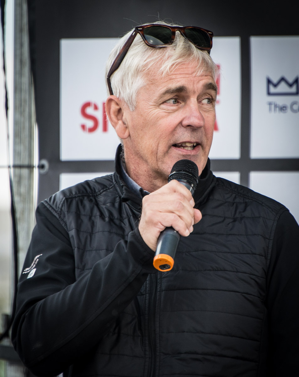 Anders Adamson i samband med den nystartade cykeltävlingen VELOTHON STOCKHOLM den 13 september 2015.